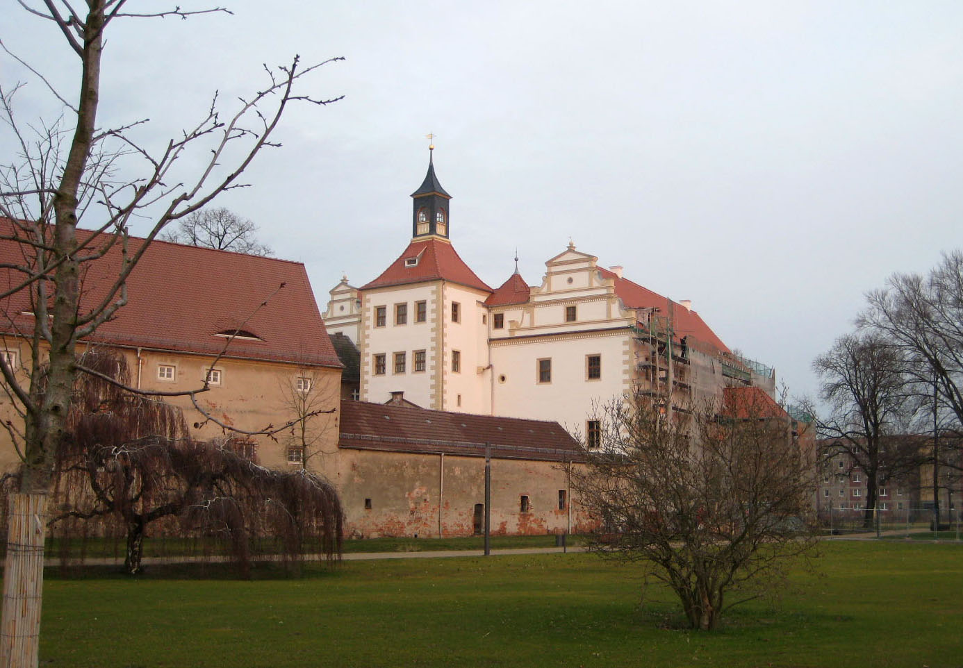 Schloss Finsterwalde, Blick von Nordwesten